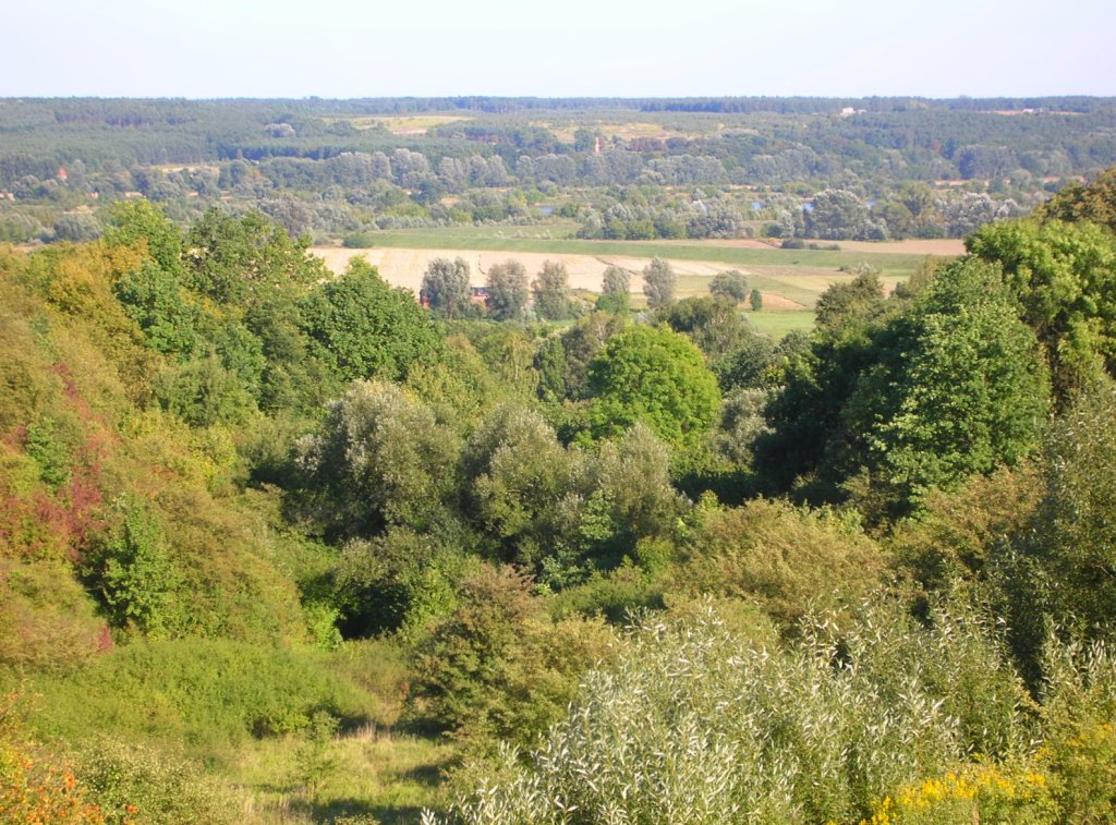 Fordońska Dolina Wisły widziana ze zbocza w rejonie uroczyska Prodnia w Jarużynie